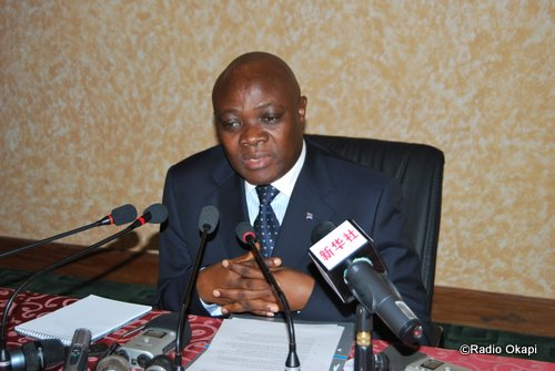 Jean-Baptiste Ntahwa Kuderwa